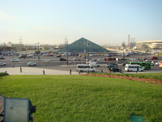 Koroğlu metrostansiyasının Musiqili alov fəvvarəsi tərəfdən görünüşü